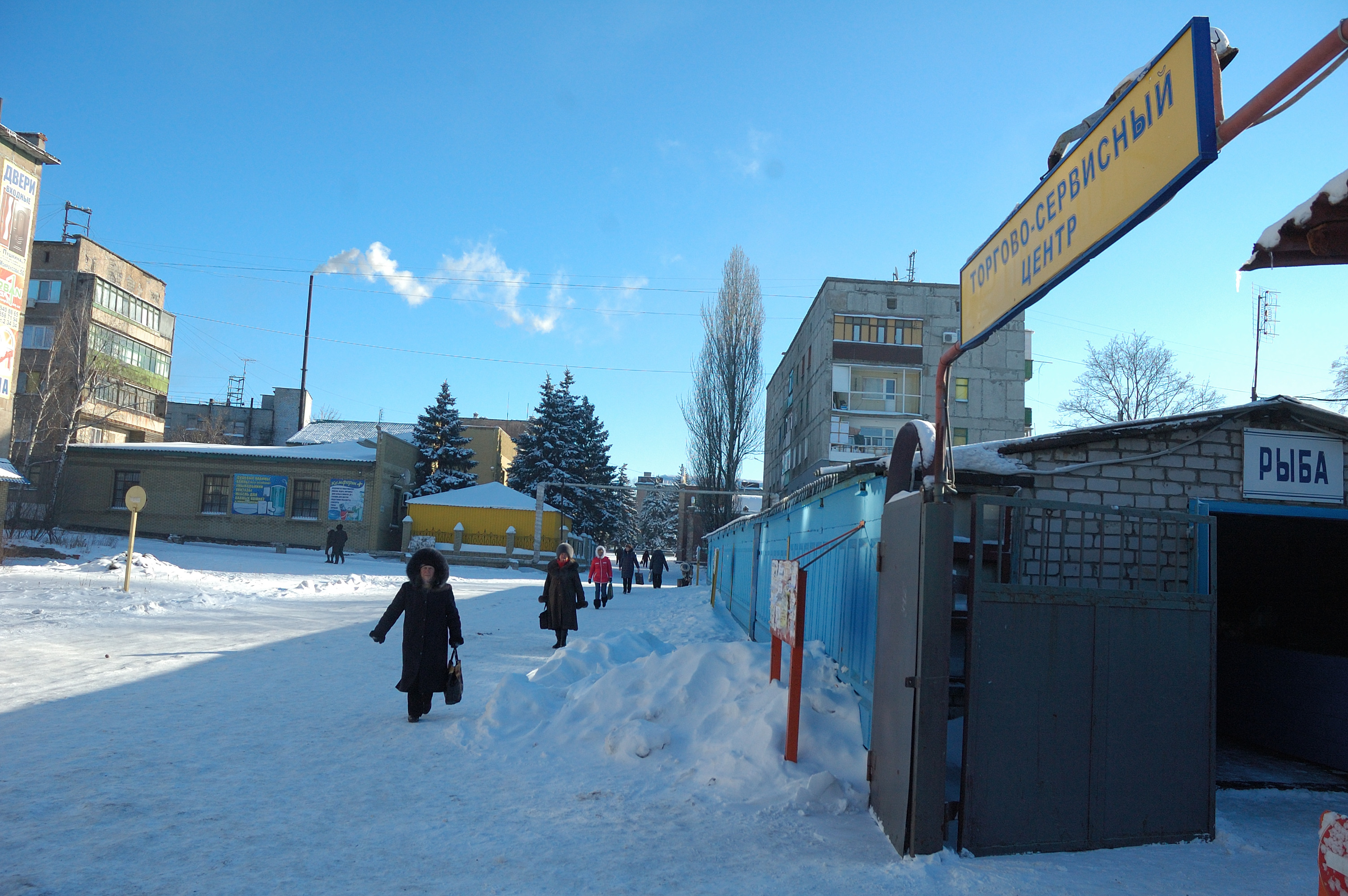 Обстановка в Дебальцеве 8 січня - мороз -25С, порожньо і спокійно.